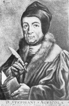 Bildbeschreibung: Zeitgenössischer Stich von Stephan Agricola (1491-1547) Quelle